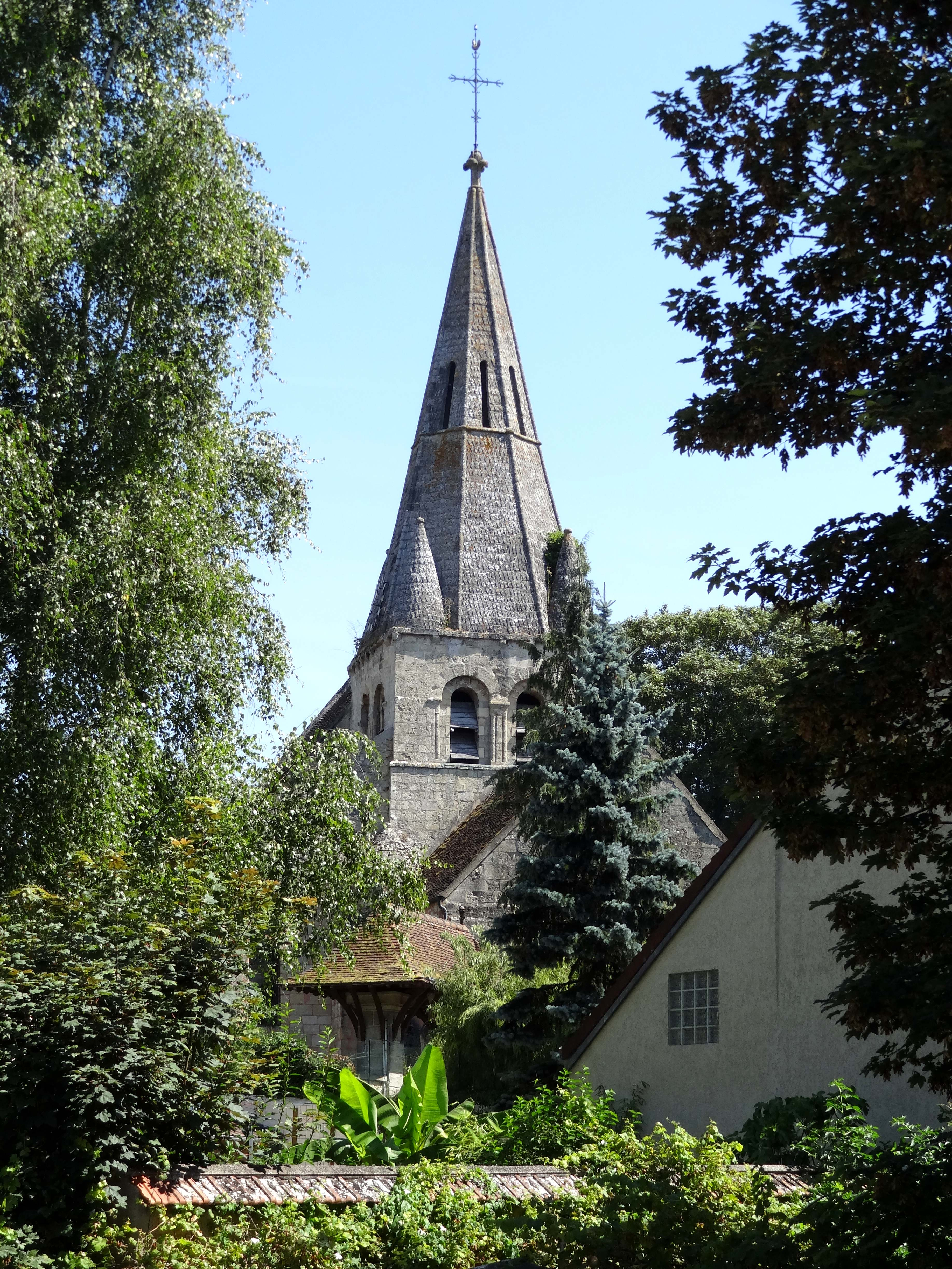 Église Notre-Dame-de-l'Assomption de Gaillon-sur-Montcient - voir titre.